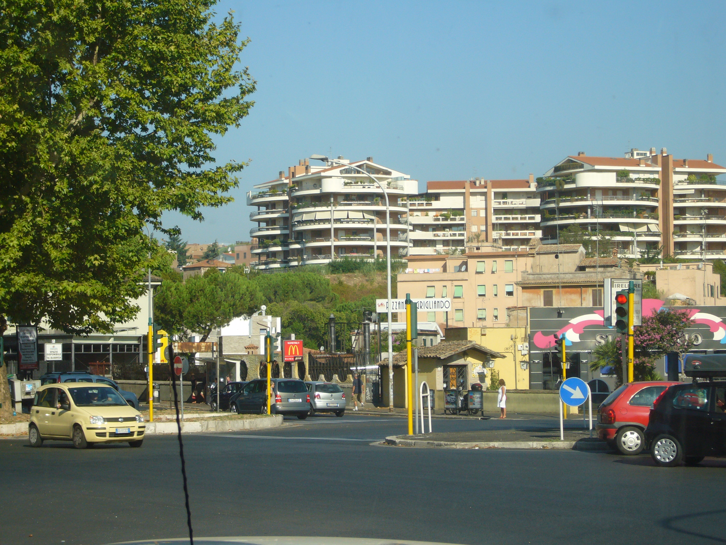 Roma, piazzale Jonio (Montesacro - Val Melaina)